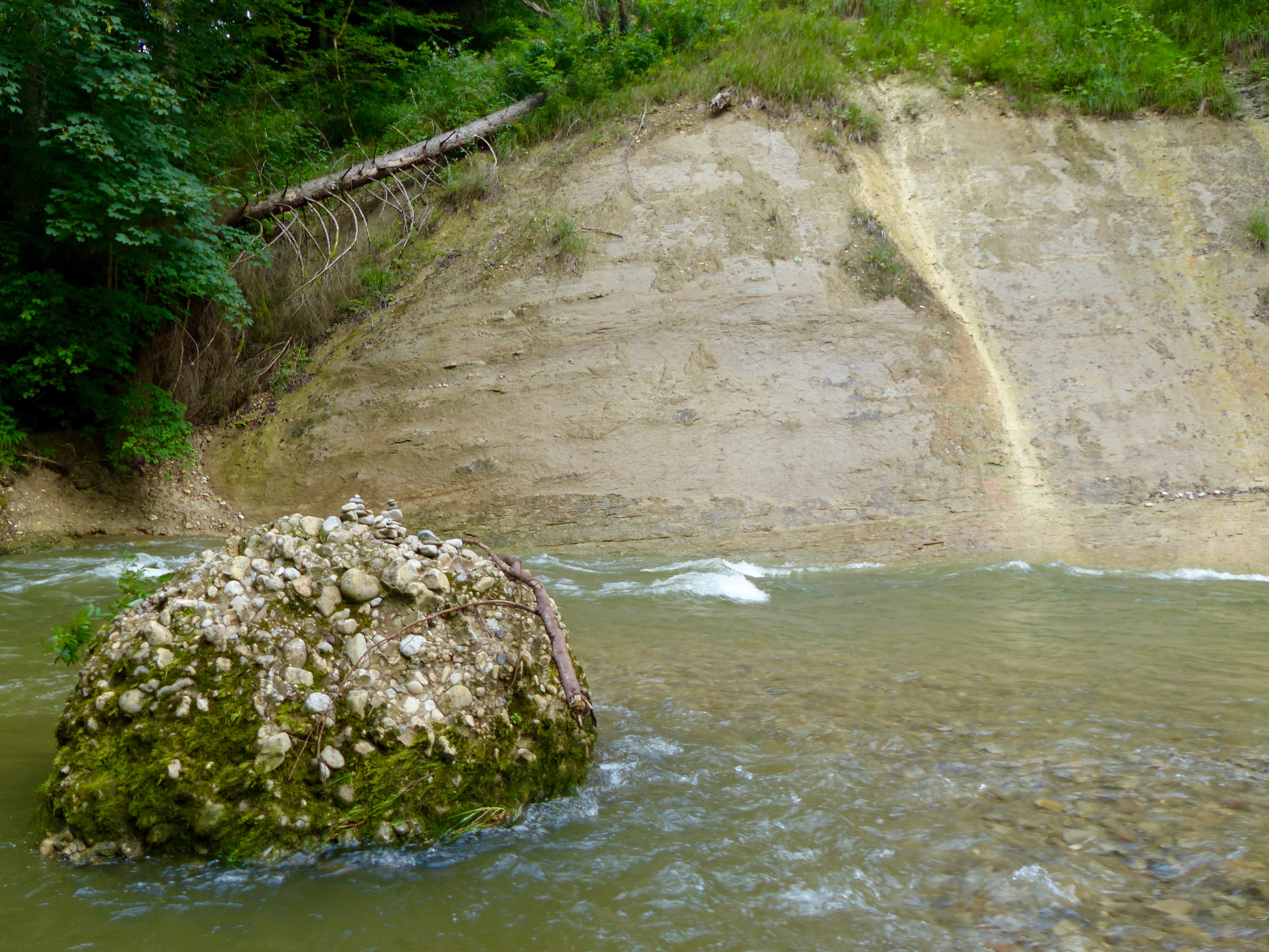 WikiProjekt Landstreicher Geotop Eistobel: Molasse (Mergel)